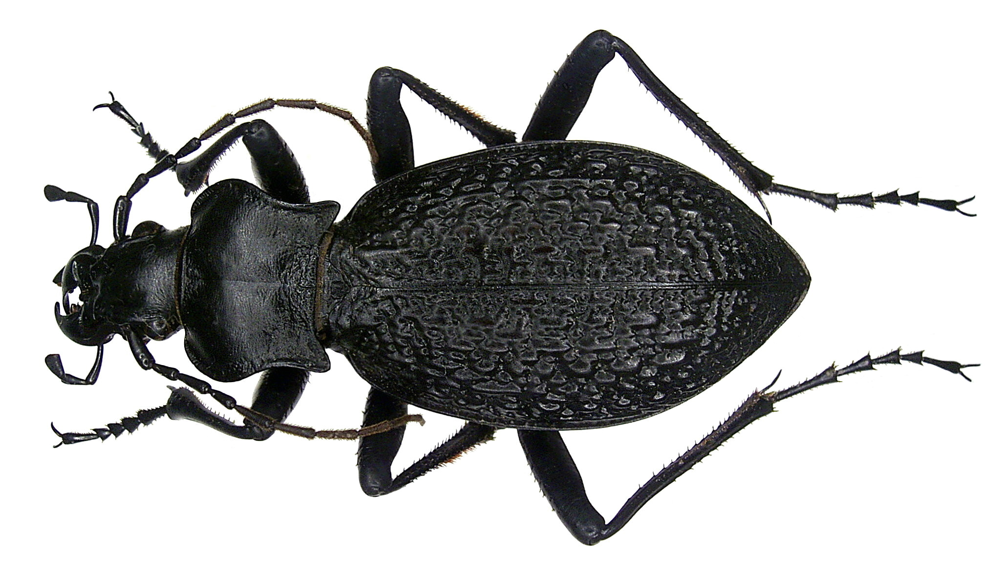 Familie: Carabidae Größe: 32 mm Fundort: Pakistan, Mansehra leg. H.Staven, 2001; det. K.Staven, 2001 Foto: U.Schmidt, 2008